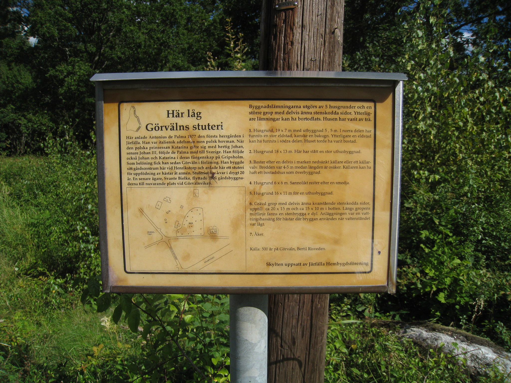 Skylt med texten "Här låg Görvälns stuteri", vid korsningen av Görvälnsvägen och Marhagsvägen, Järfälla. Här anlade Antonius de Palma 1577 den första herrgården i Järfälla. Stuteriet var kvar i drygt 20 år.